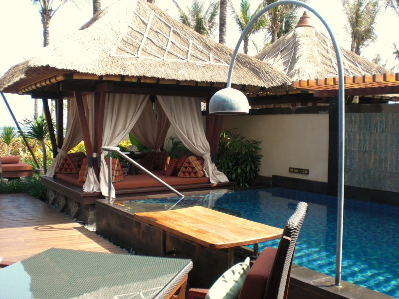 villa pool